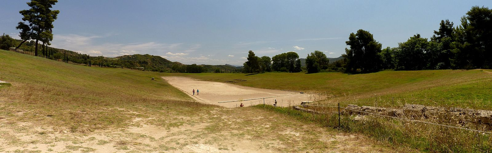 Olympia (Greek: Ολυμπία Olympía), a sanctuary of ancient Greece in Elis, is known for having been the site of the Olympic Games in classical times, the most famous games in history. You can use the images for free. But a link to - I would be happy :)